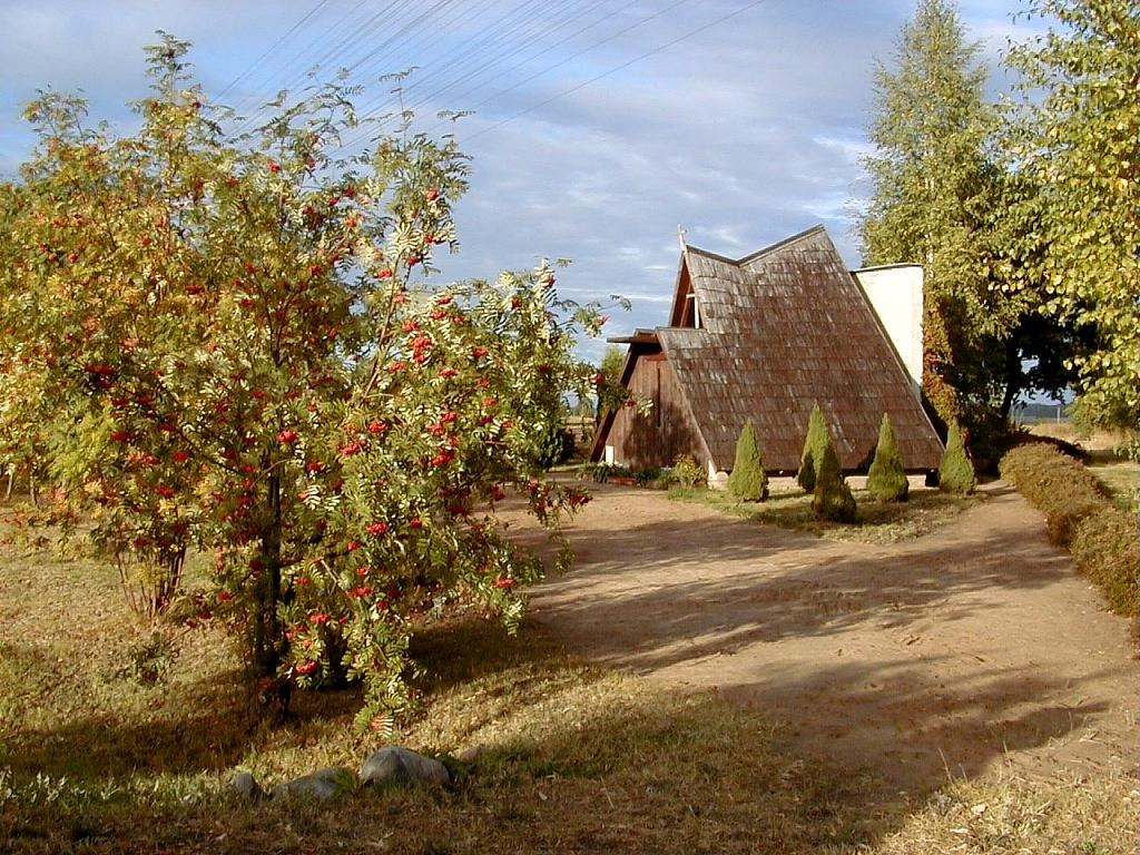 Murmastienes krucifiksa namiņš 2002-09-14